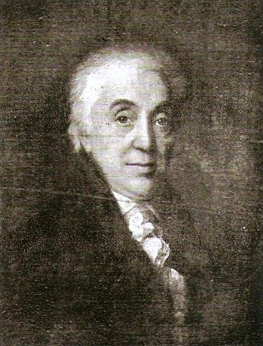 Georg WilhelmPfingsten (1746–1827)